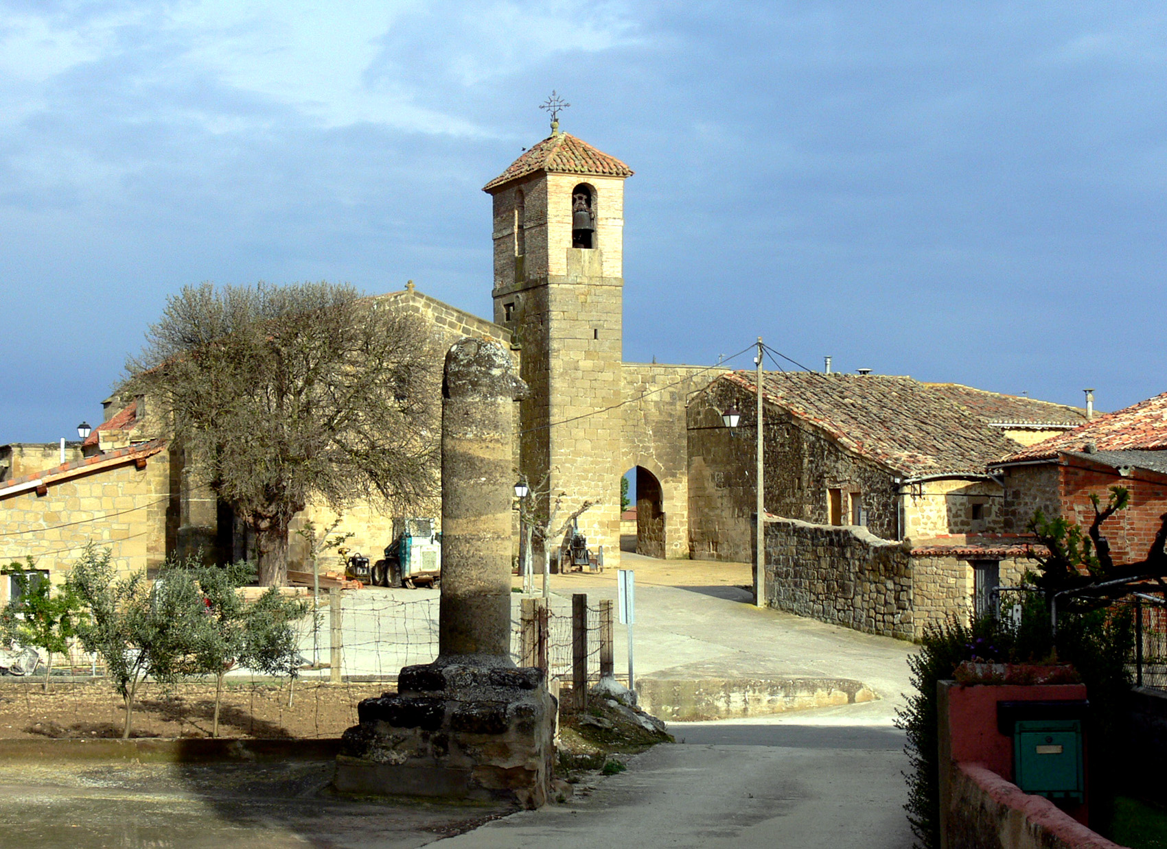 Iglesia de San Román en Villaseca, aldea de Fonzaleche (La Rioja - España).